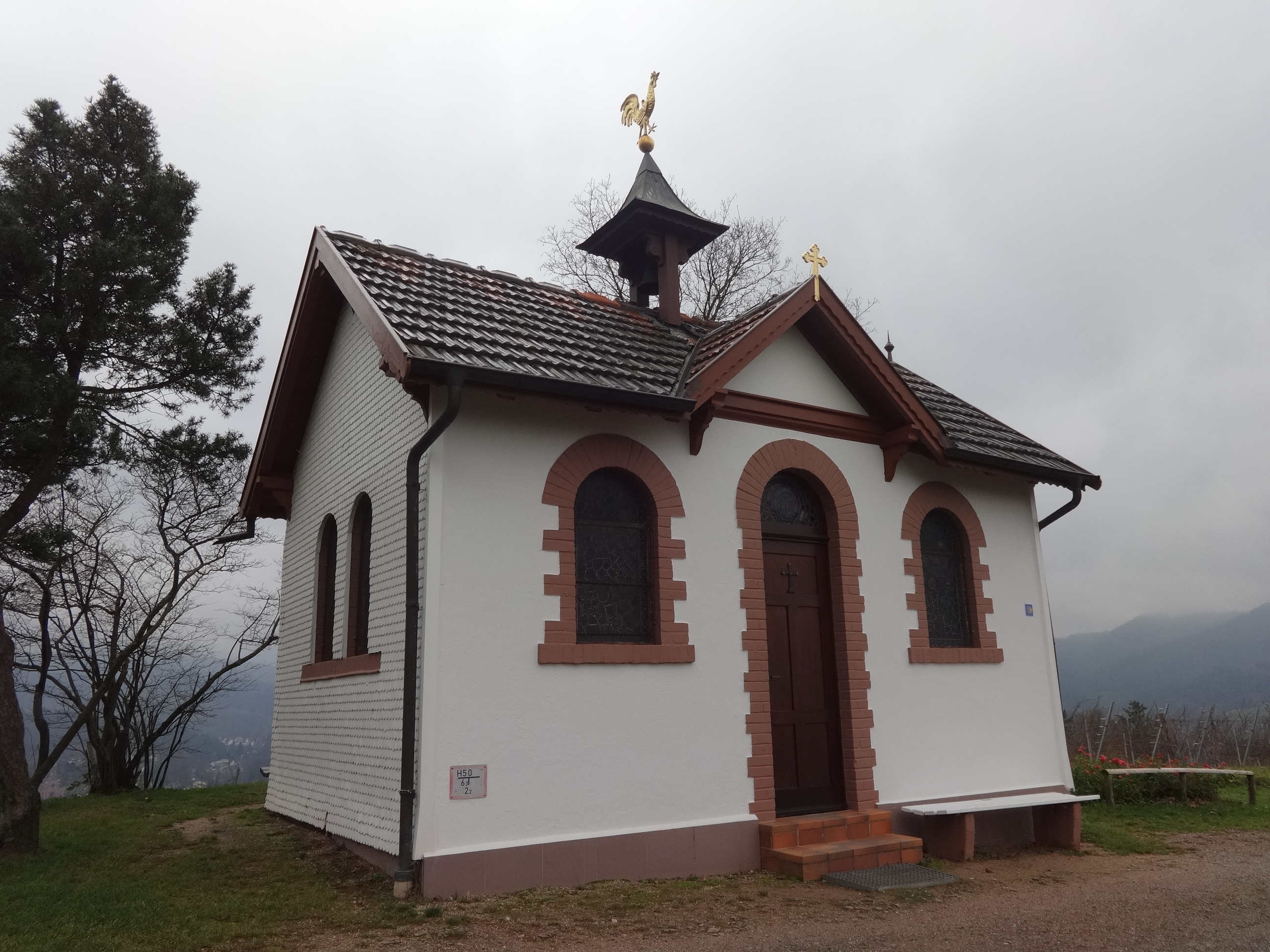 Der Panoramaweg Baden-Baden ist ein rund 40 Kilometer langer Wanderweg, der um die Stadt Baden-Baden führt. Er wurde 1997 neugestaltet und 2004 vom Deutschen Tourismusverband als „schönster Wanderweg“ ausgezeichnet.